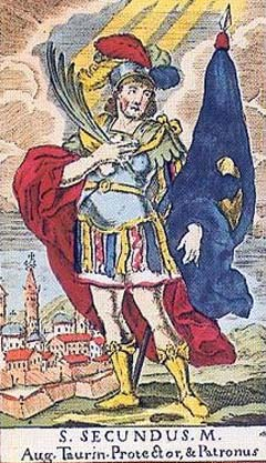 San Secondo Martire (+286 el il 306).